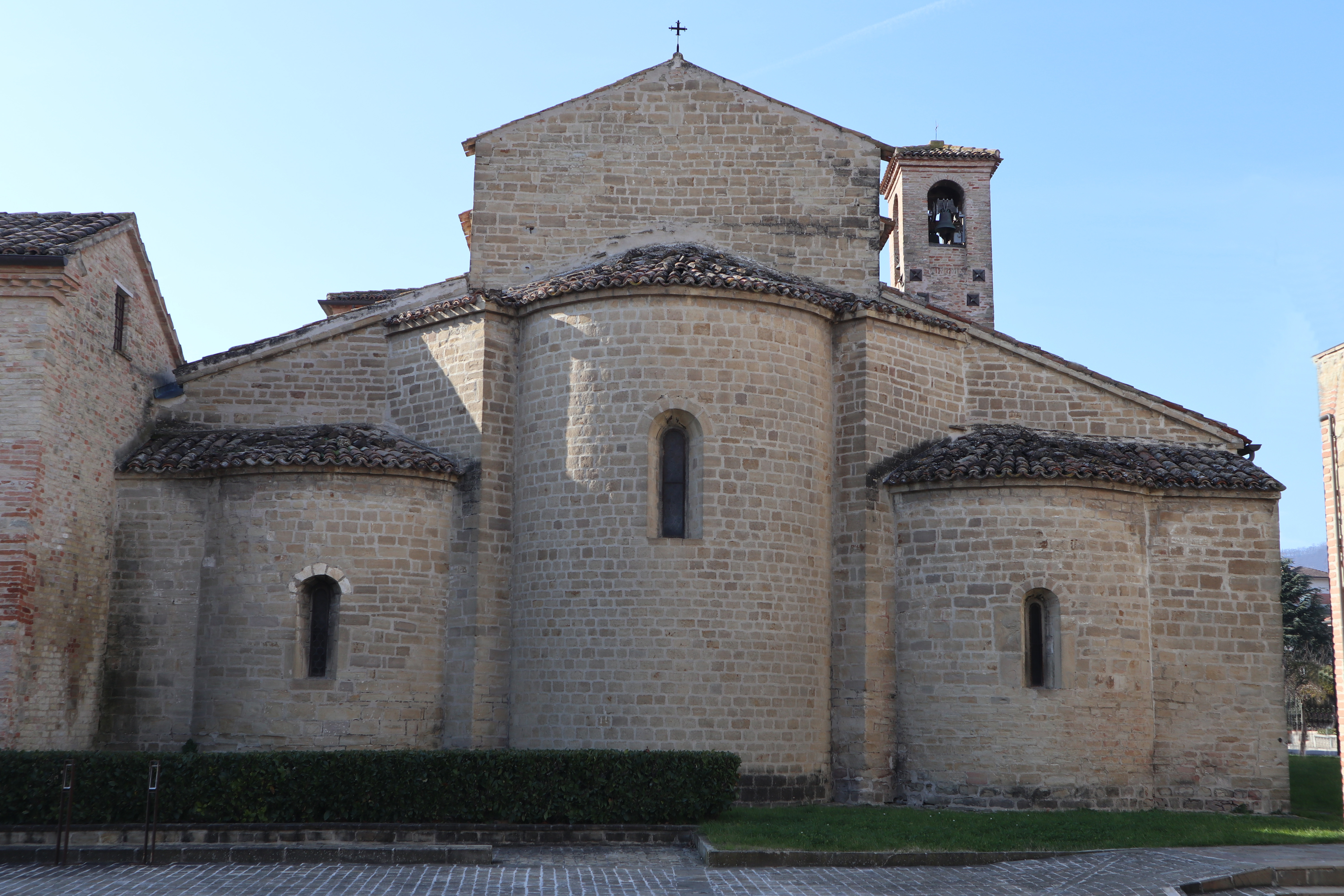 XII secolo